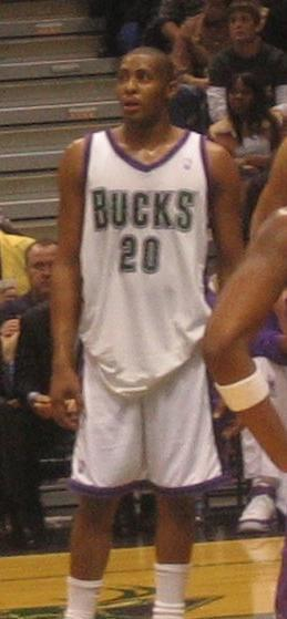 Jamaal Magloire in a Milwaukee Bucks vs Atlanta Hawks game